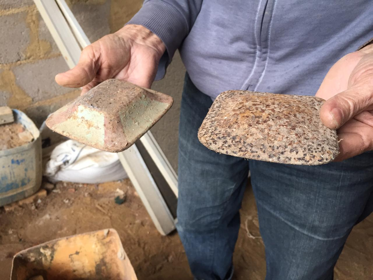 Senhor mostra discos usados no jogo da malha, tradicional esporte hoje em desuso no Brasil. This photo has been taken in the country: Brazil